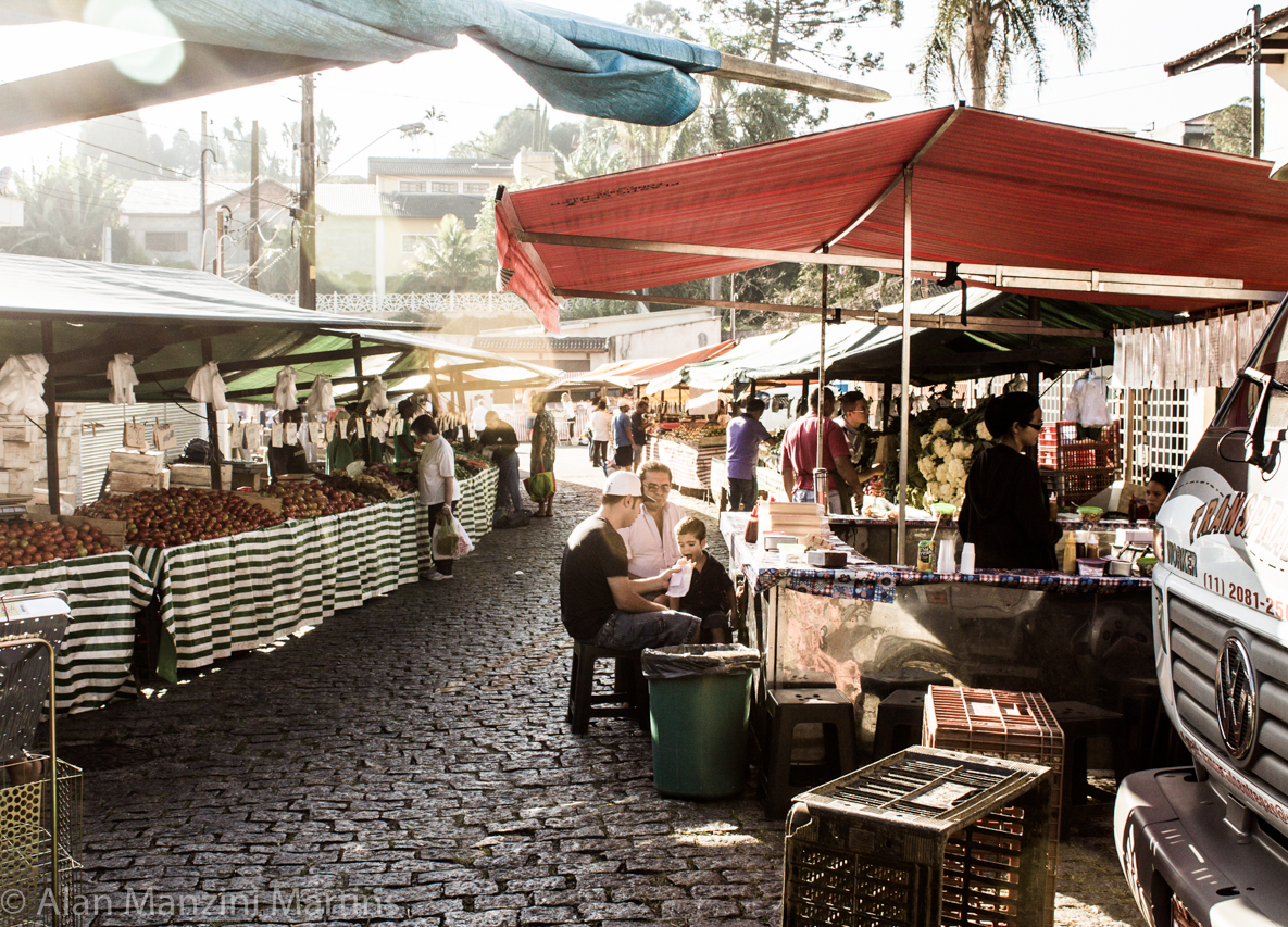 ribeirão pires - SP